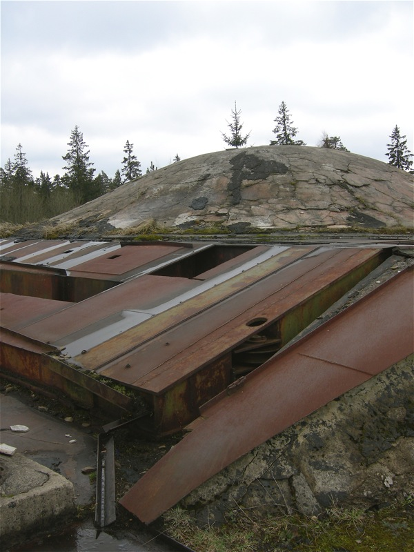 Soviet nuclear missile silo, Plokštinė